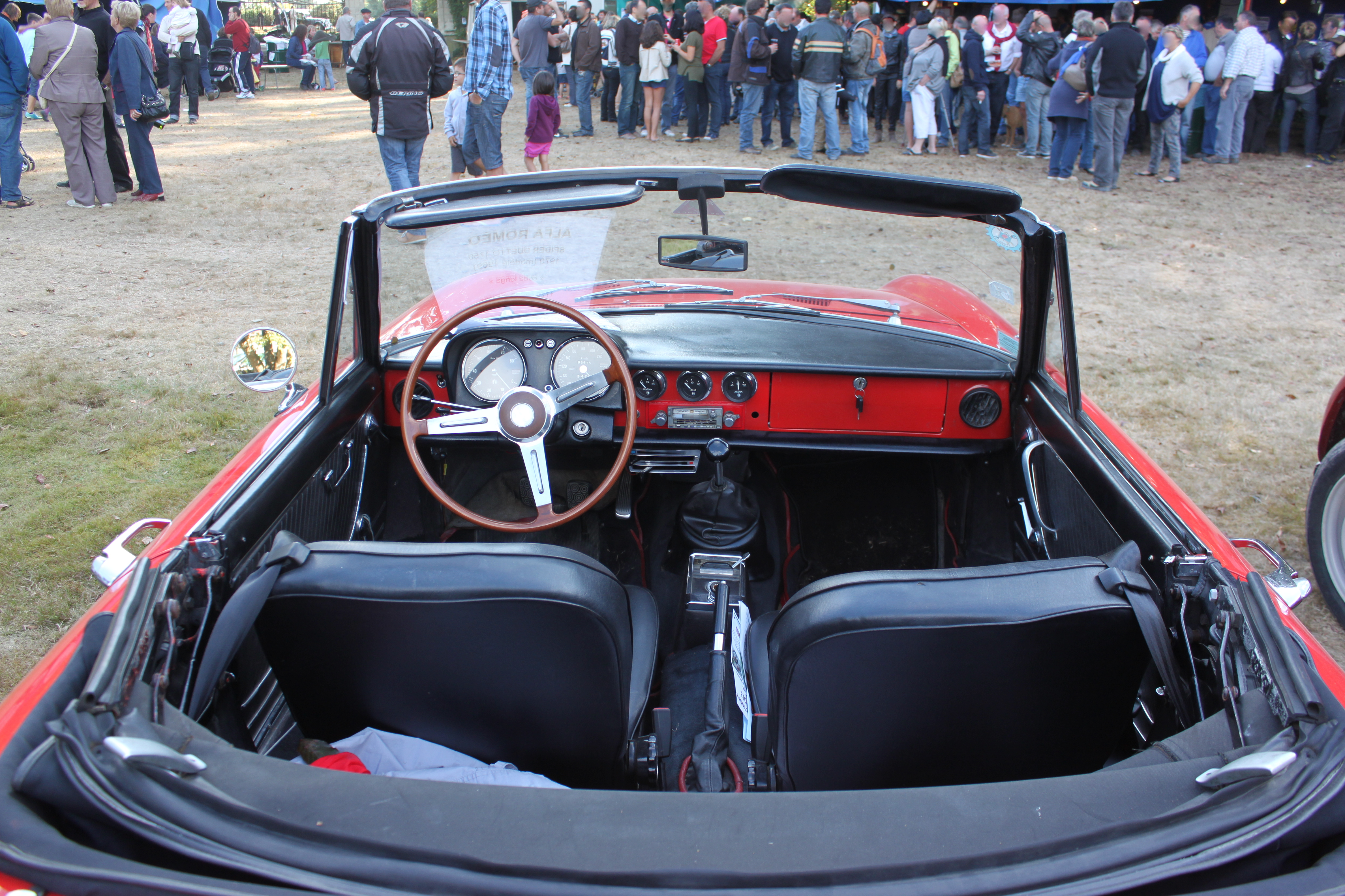 Alfa Romeo Spider Duetto 1750 Coda Longa, 1779 cm3, 5Vit, 1970.